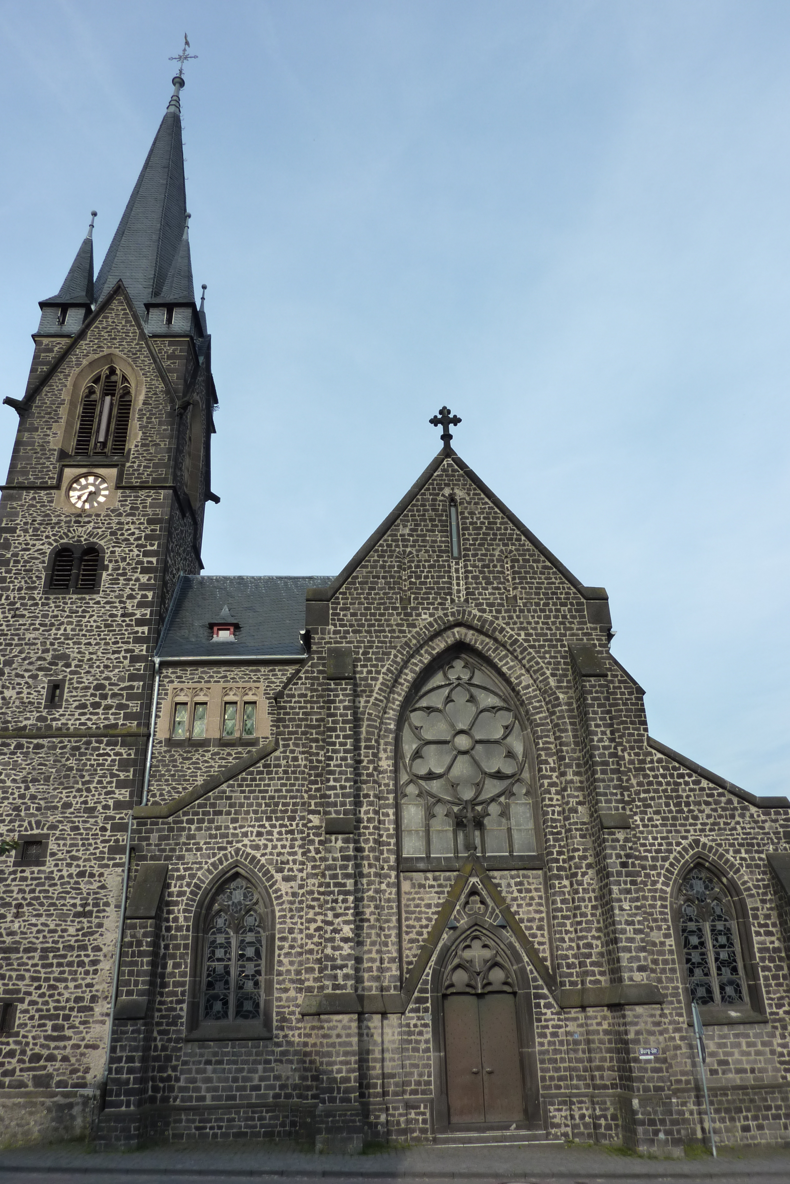 Westportal mit Turm der katholischen Pfarrkirche St. Nikolaus in Kottenheim